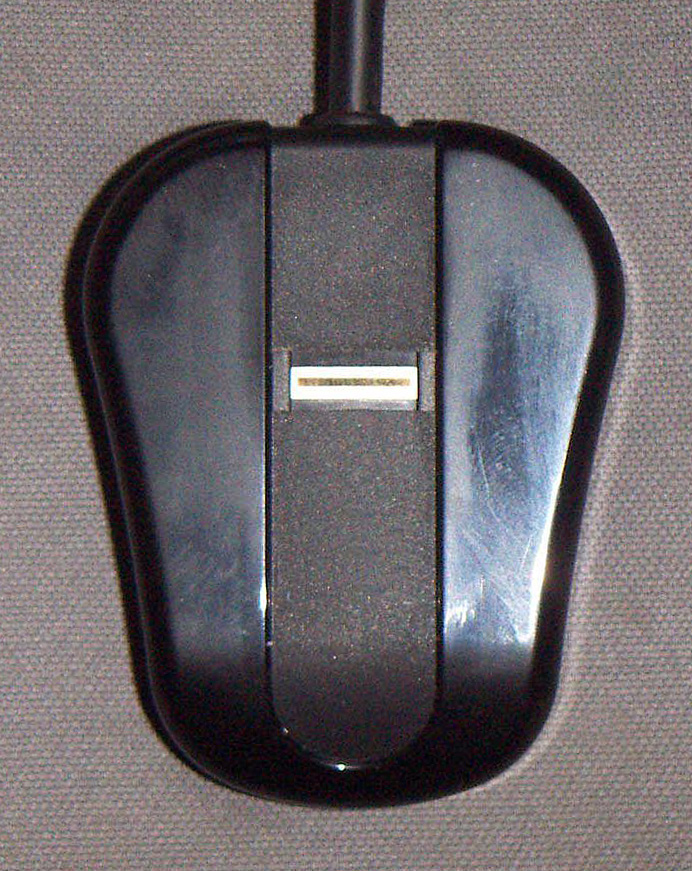 Einfacher Fingerabdruckscanner